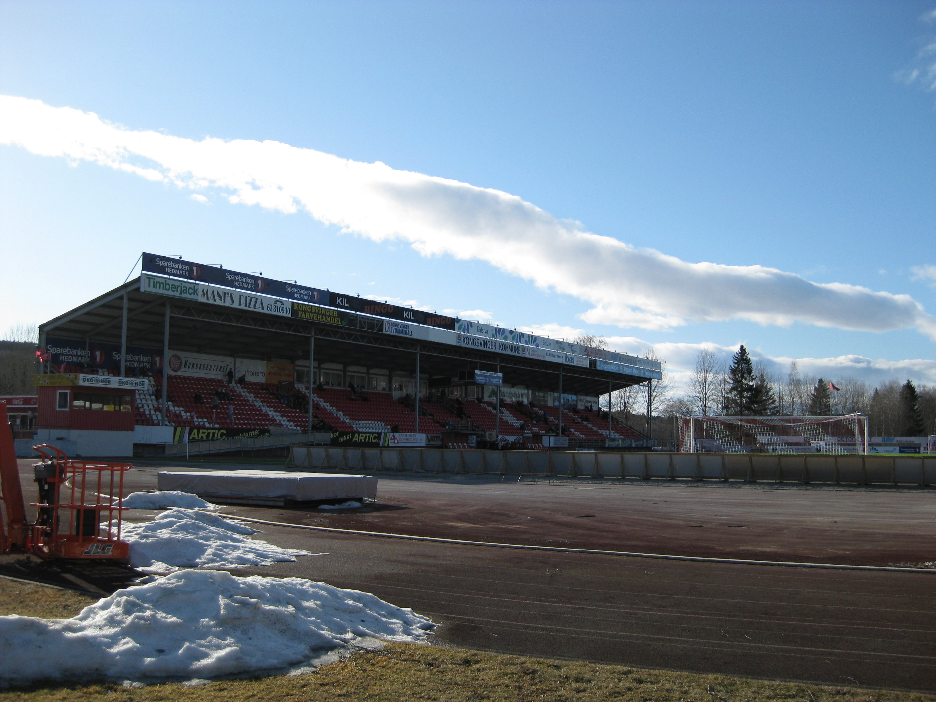 Gjemselund stadion, hjemmebanen til Kongsvinger Fotball.